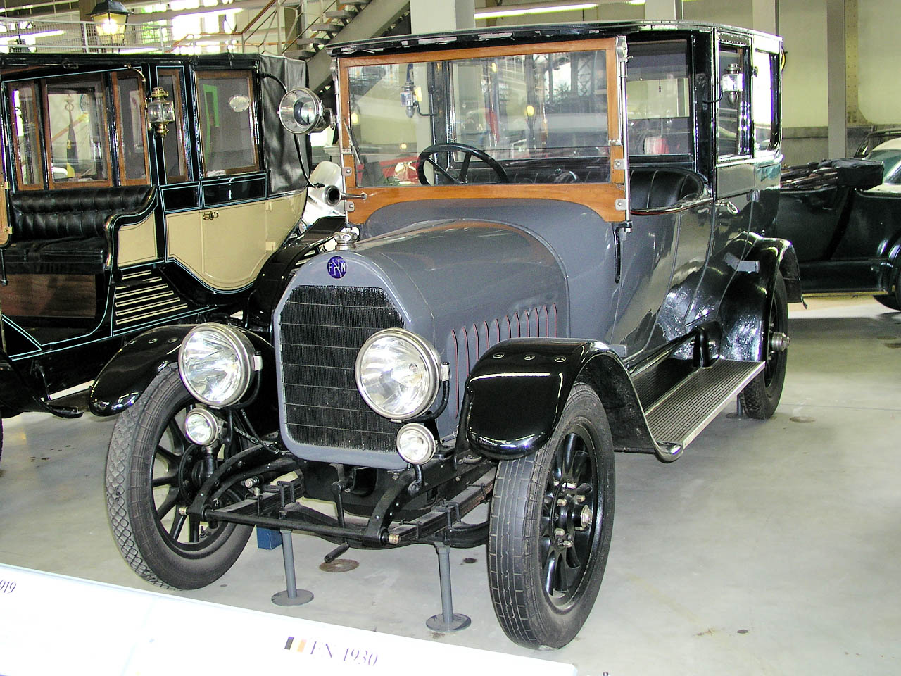 2.7-litre 4-cylinder car based on a prewar design, made in Belgium by Fabrique Nationale d'Armes de Guerre; left front-side view